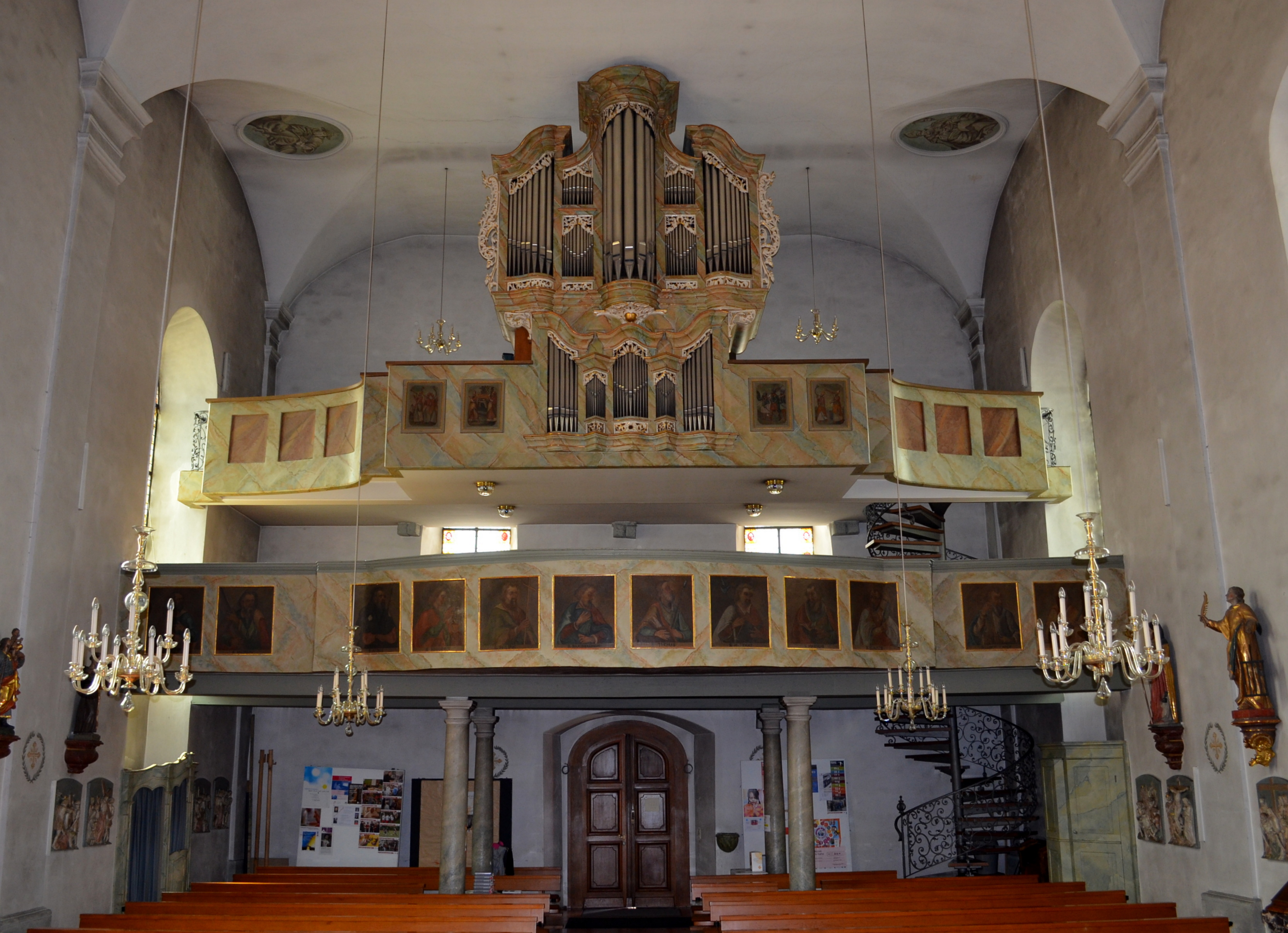 Orgel en galerijen